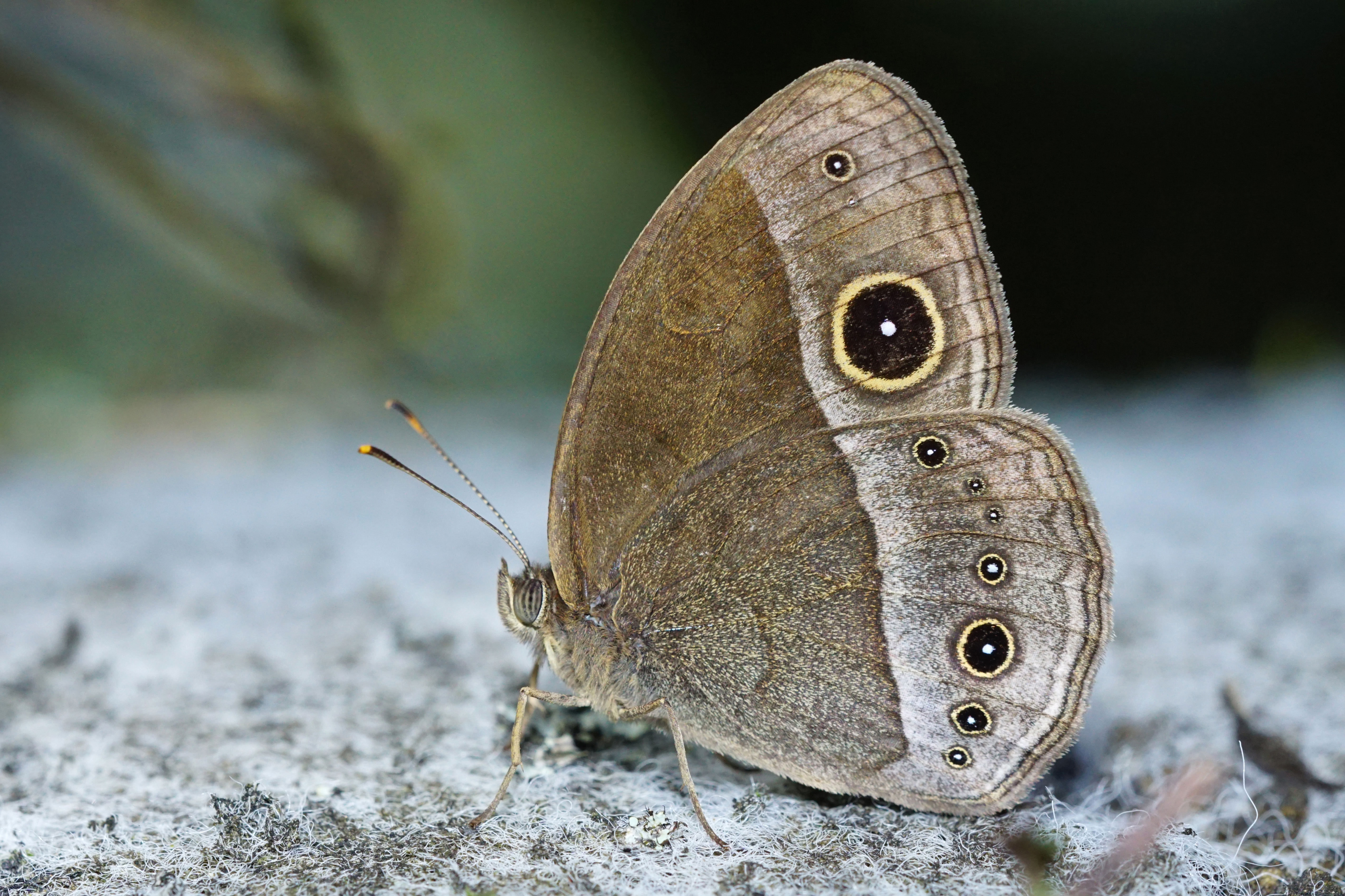 中文（台灣）: 眉眼蝶 Mycalesis francisca formosana（高海拔型）